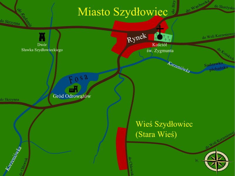 Mapa Szydłowca w XV wieku/Map of Szydlowiec in XV c.